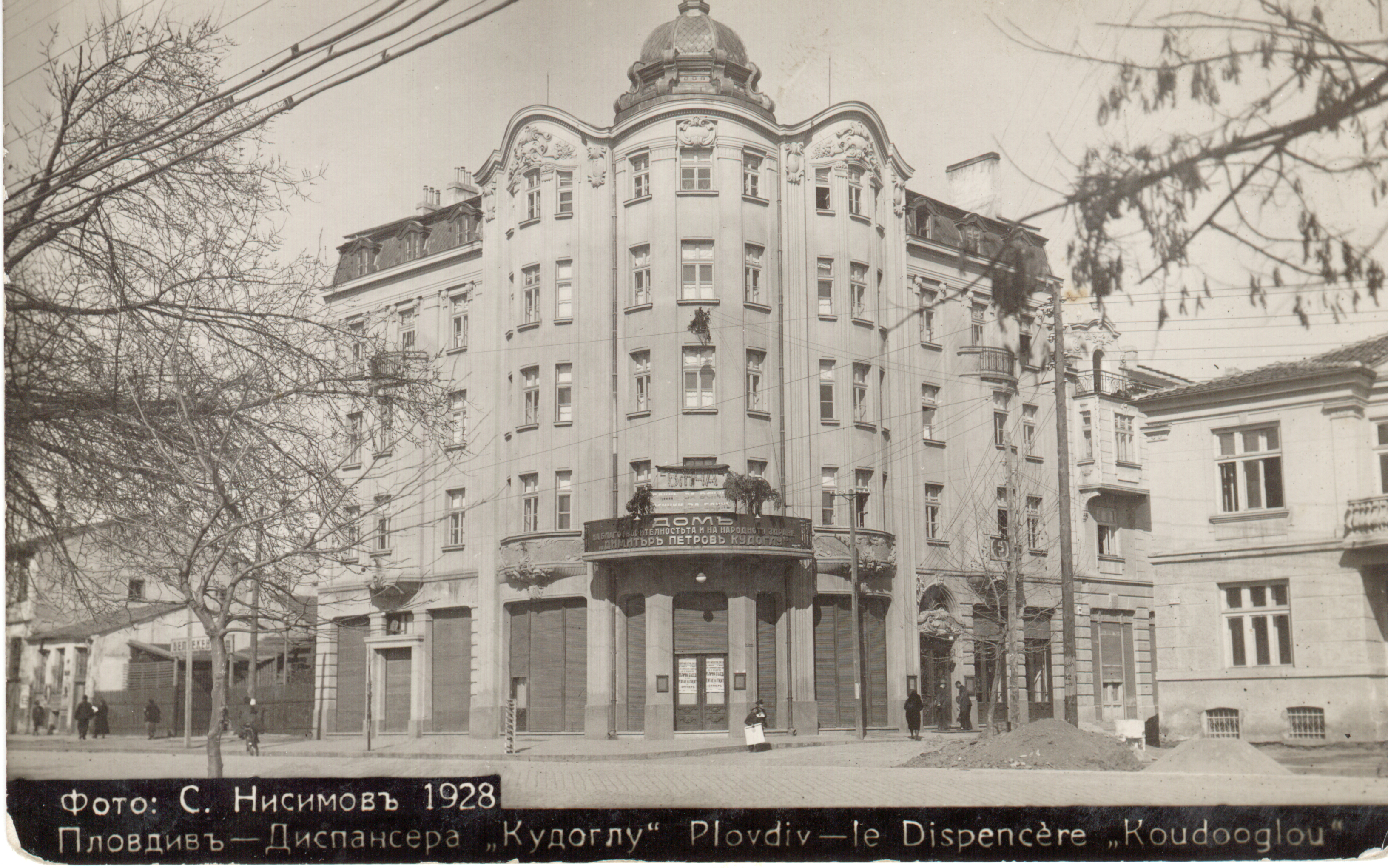 Дом за благотворителност и народно здраве Кудоглу. Фото С. Нисимовъ